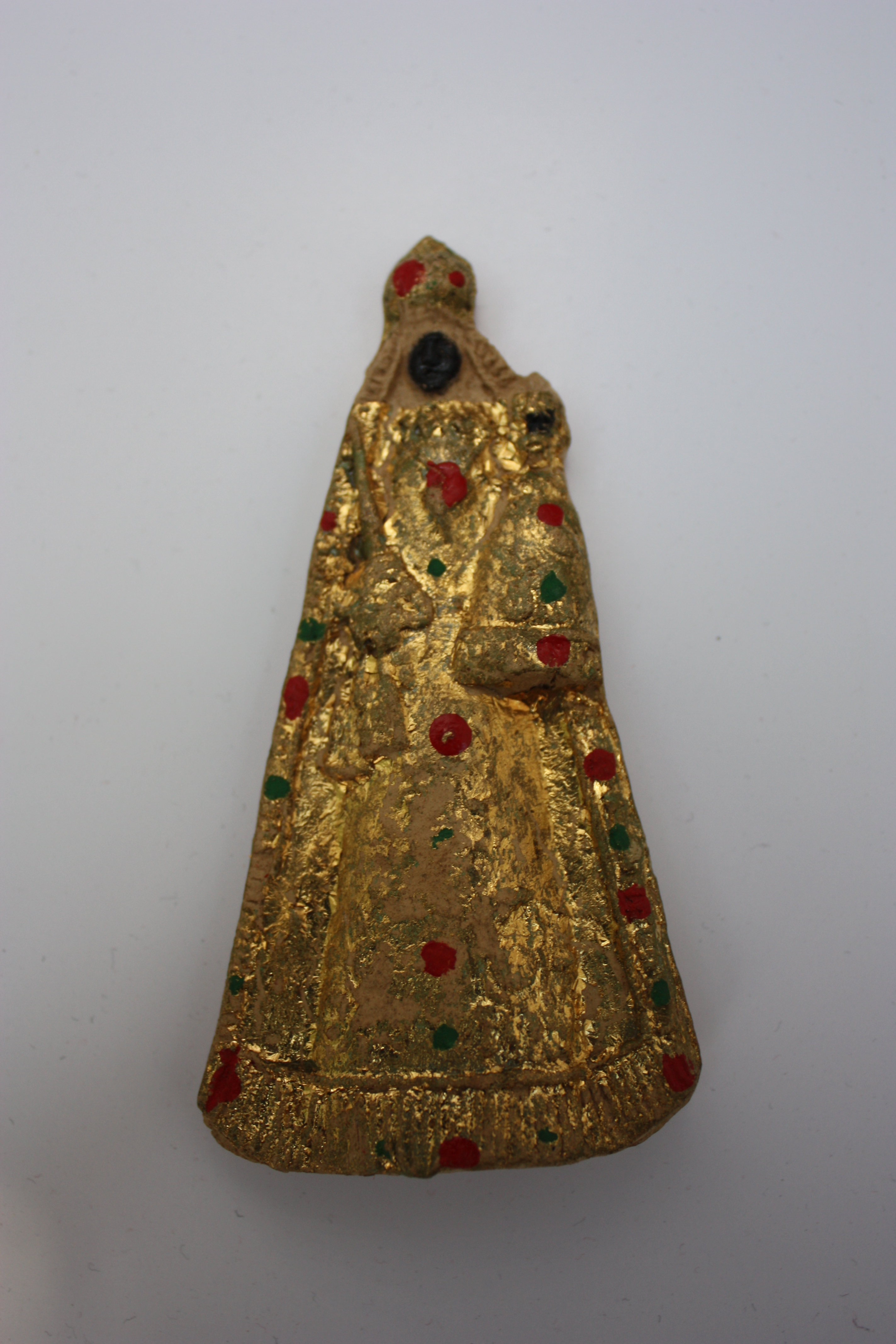 Schabfigur des Gnadenbildes von Einsiedeln. Ton, Blattgold und schwarz-rot-grüne Punktierungen. 18. Jahrhundert. 9,3 x 4,5 x 1,5 cm. Besitz des Autors